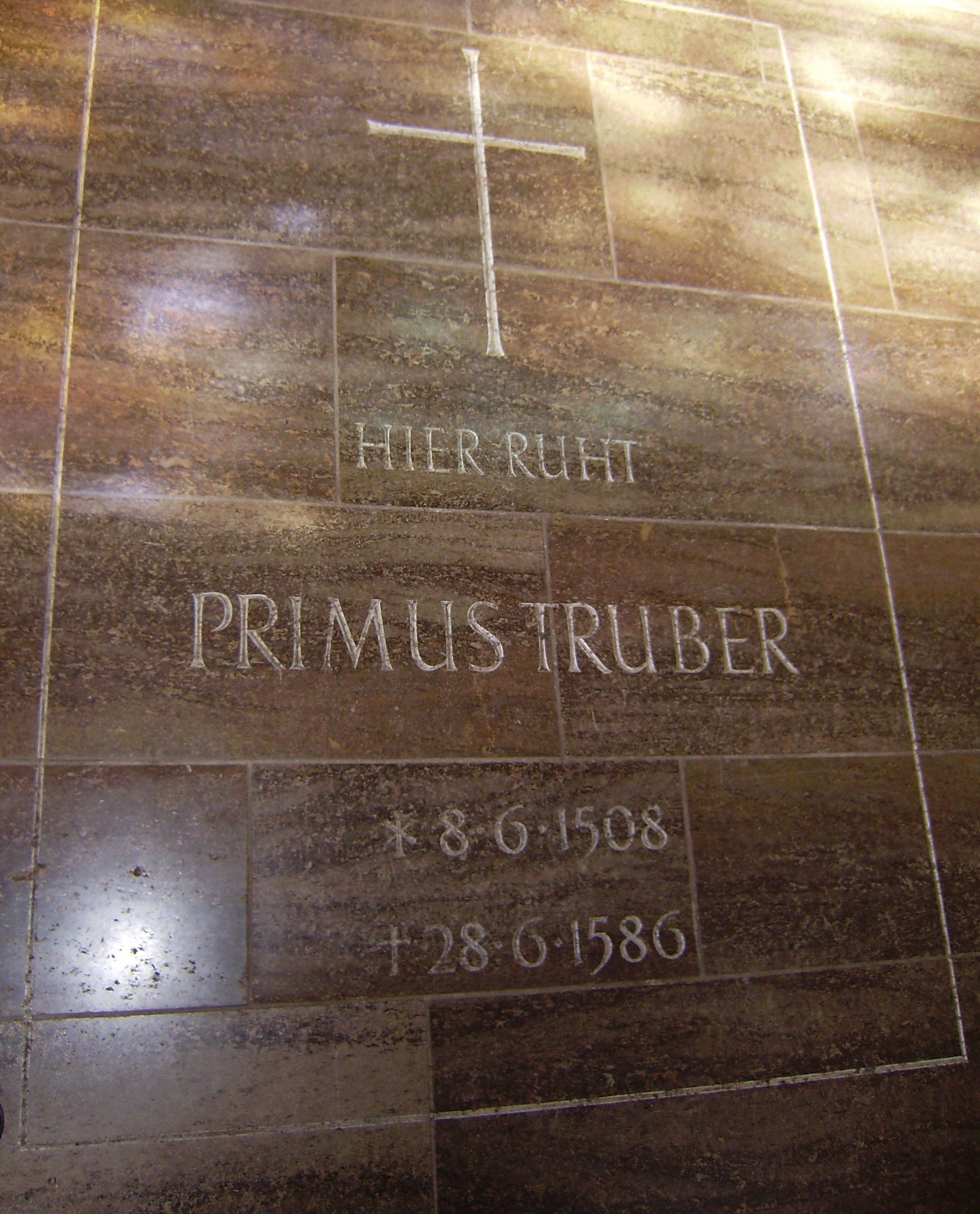 Grob Primoža Trubarja v Derendingenu